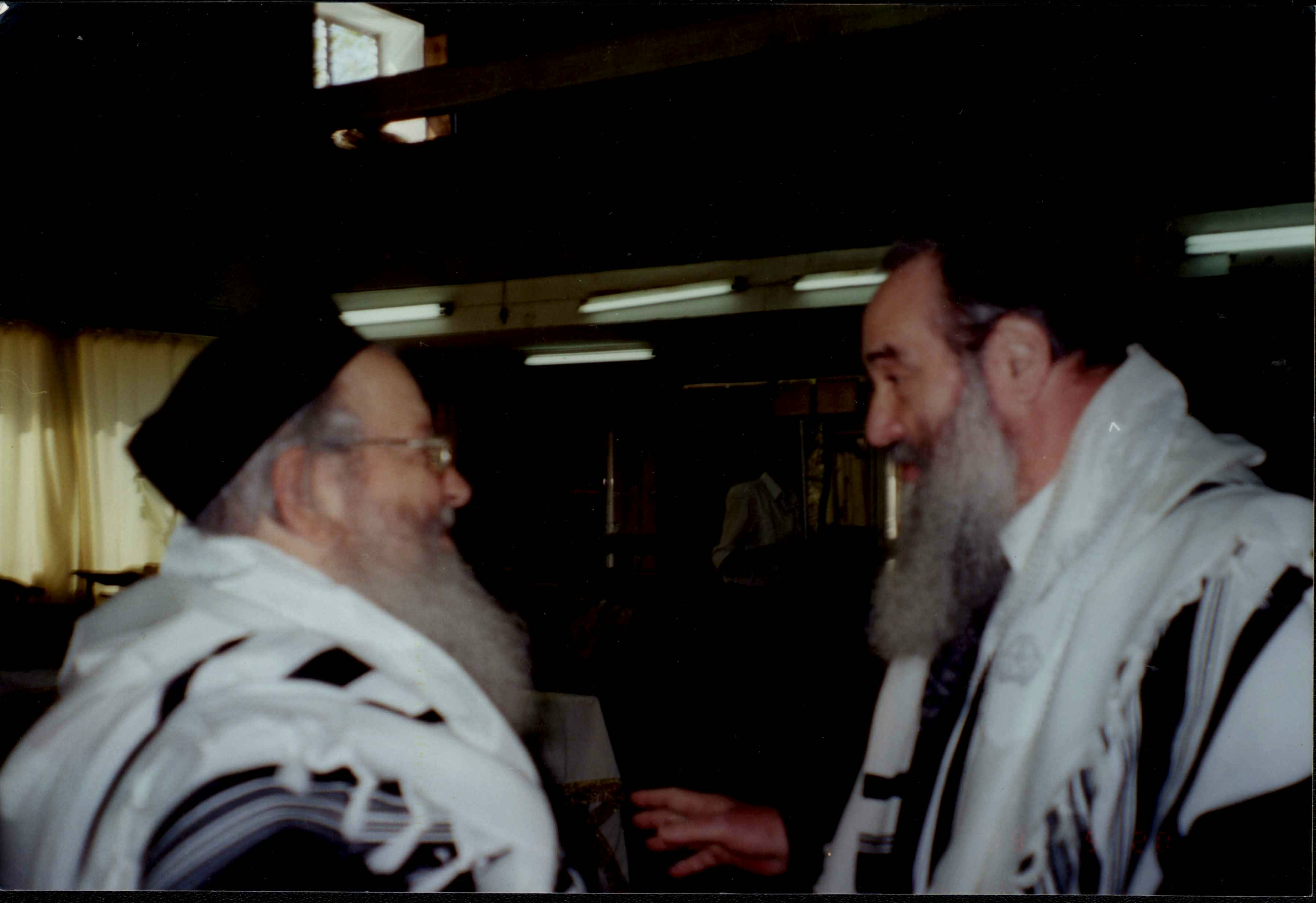 הרב משה מנחם יעקבזון עם הרב משה שמואל שפירא בבאר יעקב